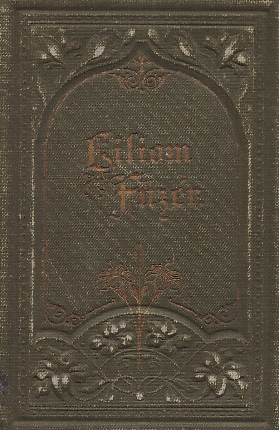 P. Soós István: Liliomfüzér (imakönyv, borítókép, 1899)